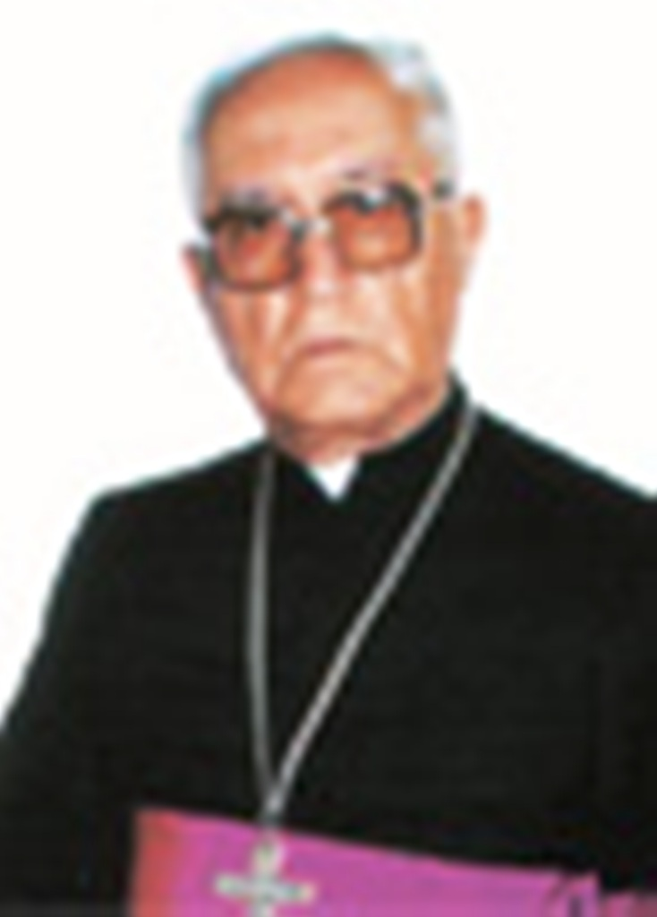 Reverendo Padre Parroco Oscar Cantuarias Pastor, fundador de la hermandad del señor de los milagros de huacho